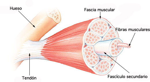 Constitución de un músculo esquelético.